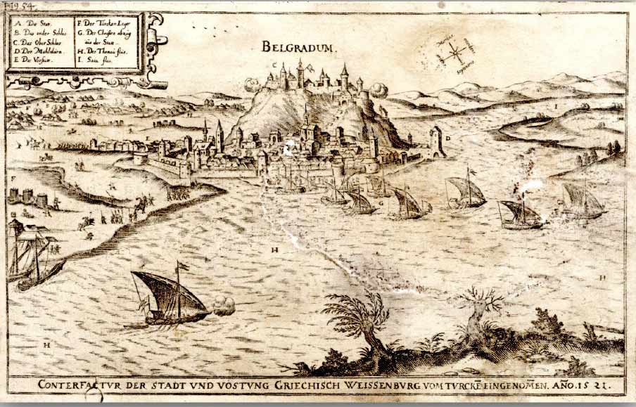 Српски (ћирилица): Панорама и ратна сцена заузимања Београда 1521. године, литографијаКаталошки број: ЗШТ, К-9/XXВ, 12